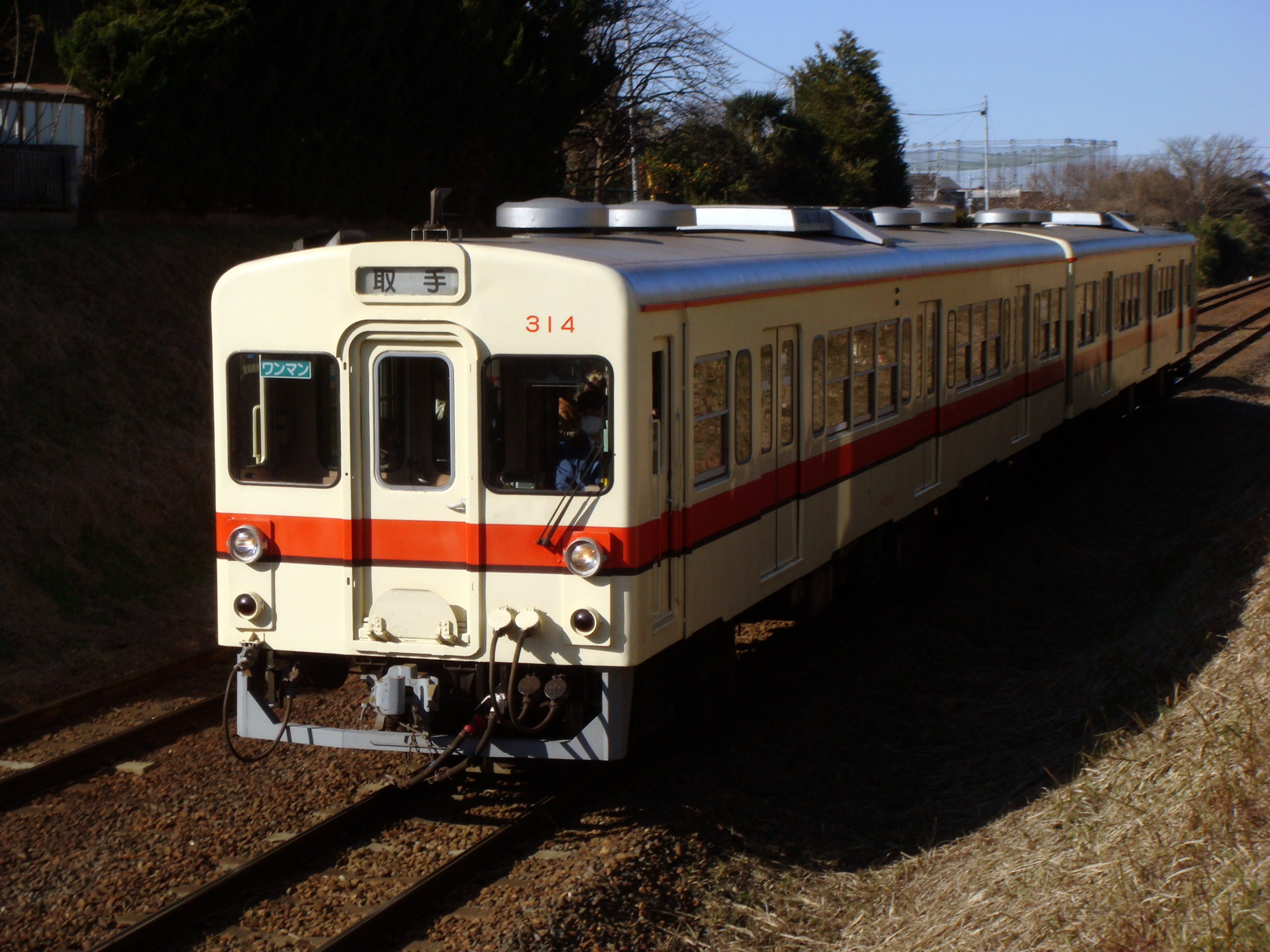 関東鉄道キハ310形314号 常総線西取手‐取手にて撮影